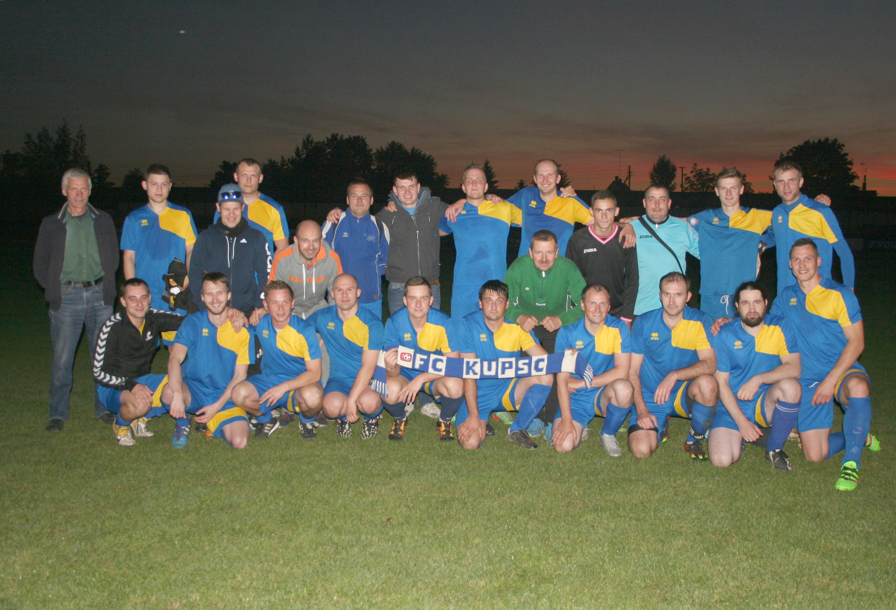 FC Kupsc komanda 2016 m. sezono pabaigoje